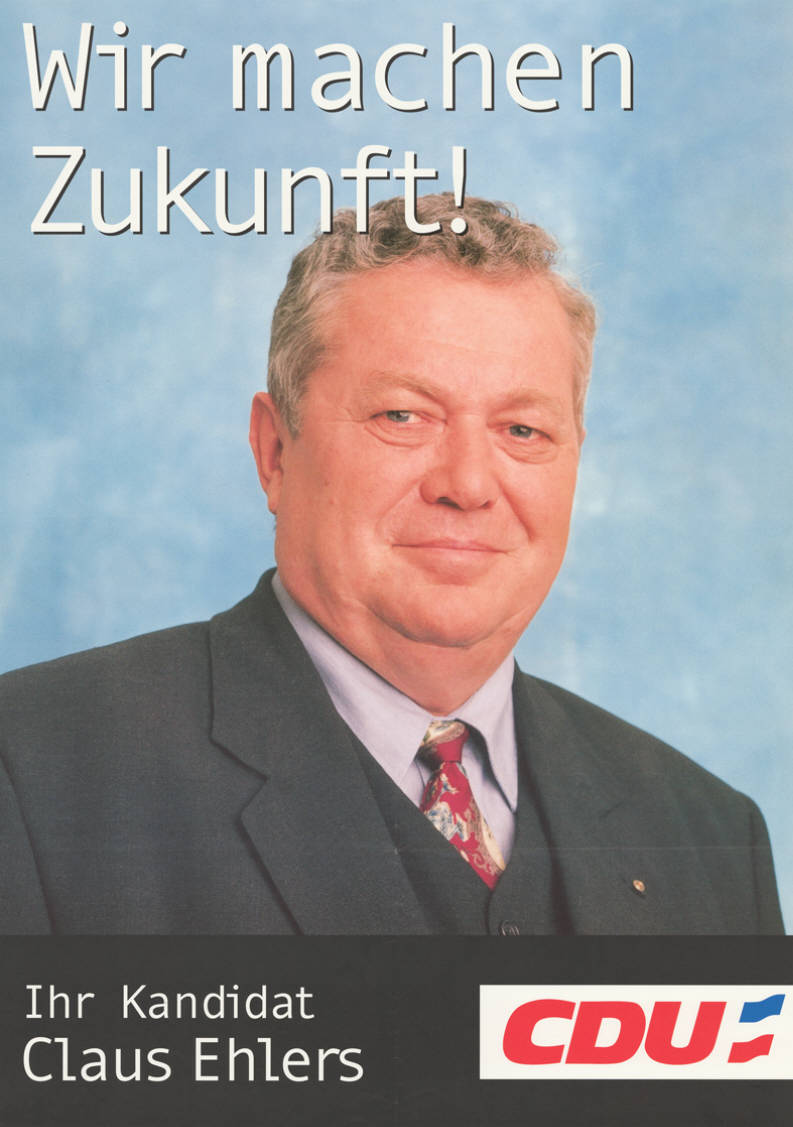 Wir machen Zukunft! Ihr Kandidat Claus Ehlers CDU Abbildung: Porträtfoto Plakatart: Kandidaten-/Personenplakat mit Porträt Objekt-Signatur: 10-012 : 1224 Bestand: Landtagswahlplakate Schleswig-Holstein (10-012) GliederungBestand10-18: Landtagswahlplakate Schleswig-Holstein (10-012) » CDU Lizenz: KAS/ACDP 10-012 : 1224 CC-BY-SA 3.0 DE